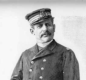 Imagen del Capitán de Fragata Fernando Villaamil, en 1894